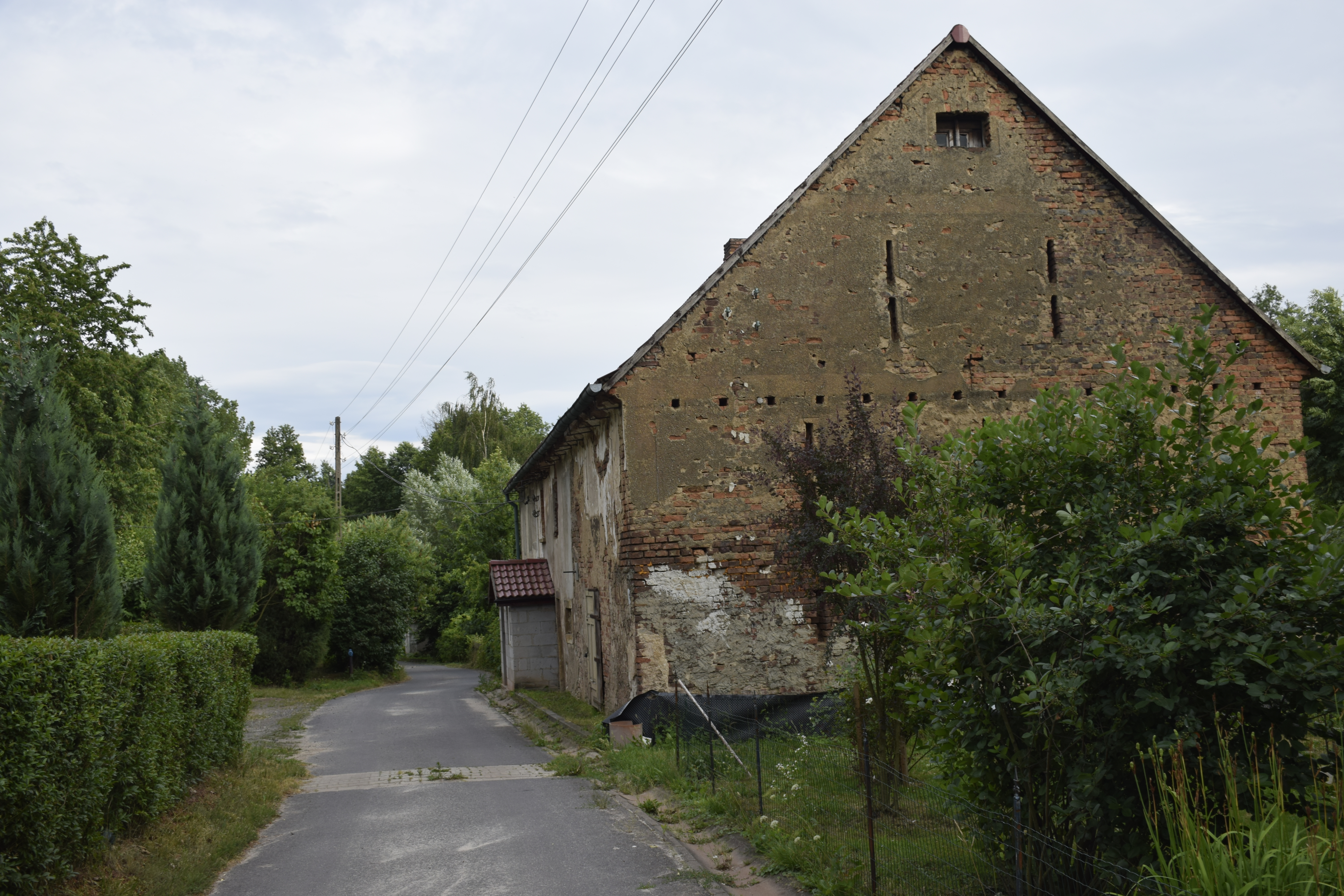 Wrony (województwo dolnośląskie) Polska.